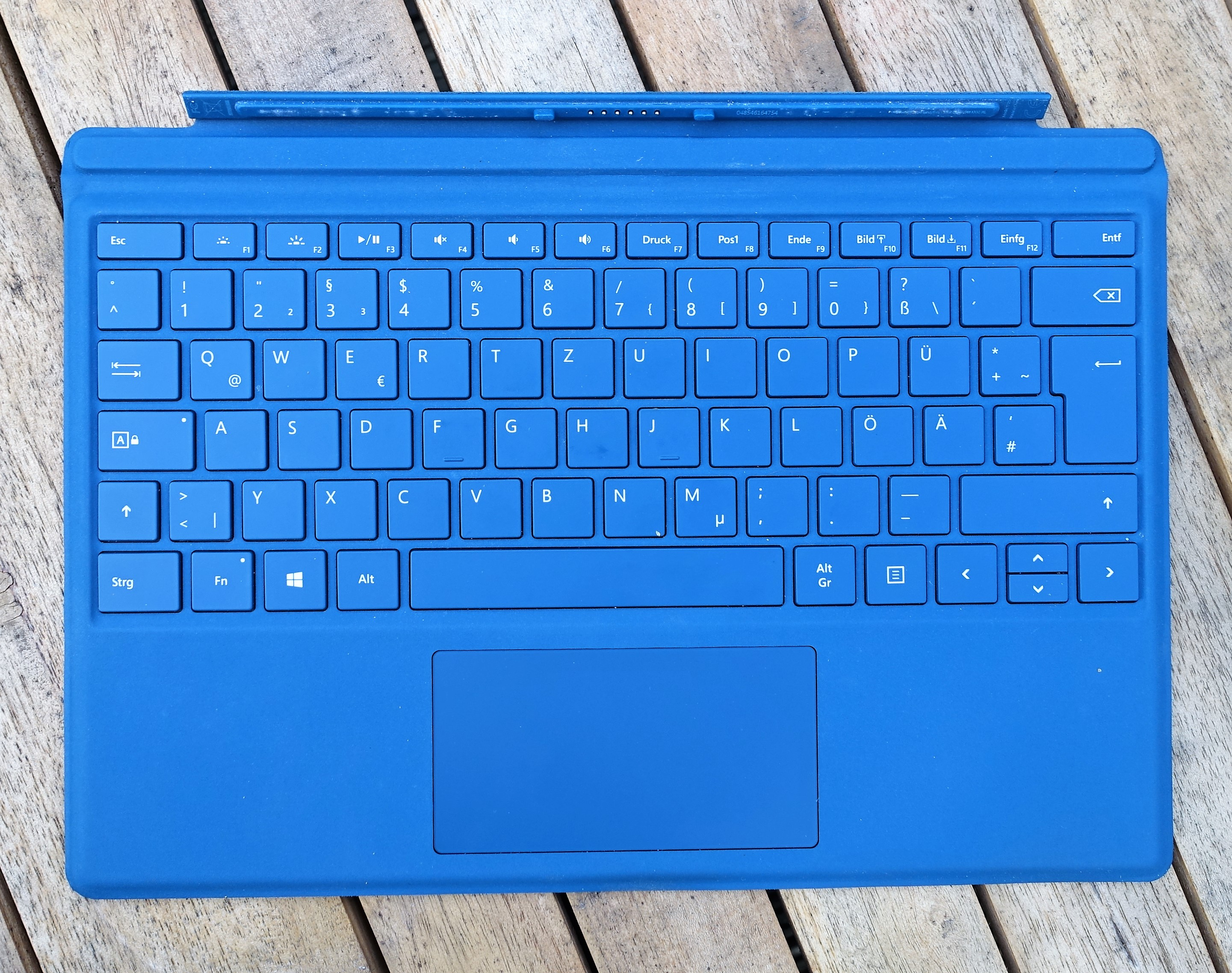 Das Type Cover 4 in der Farbvariante petrol